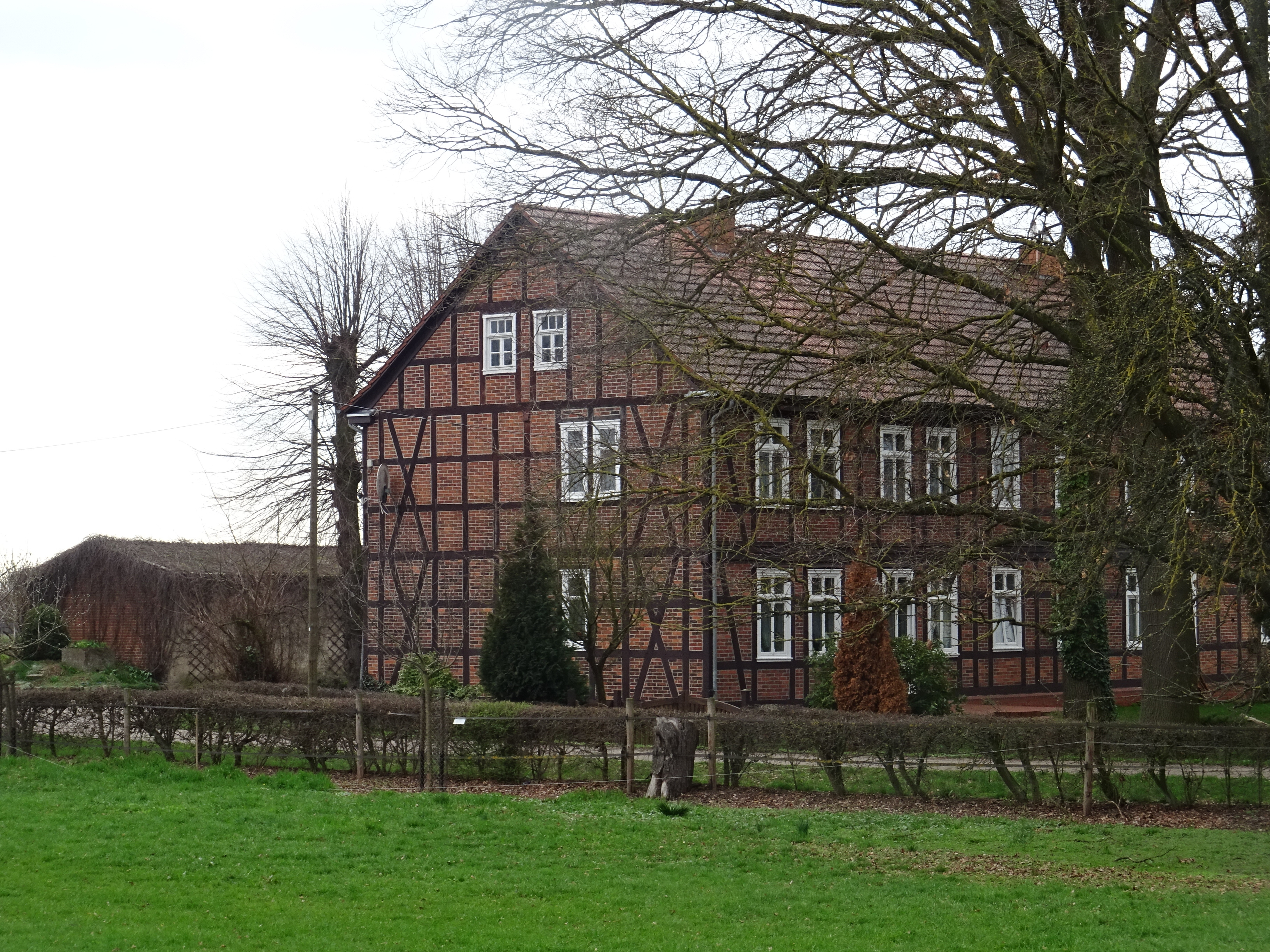 Ostorf, Stadt Seehausen (Altmark), denkmalgeschütztes Wohnhaus Ostorf 3-7